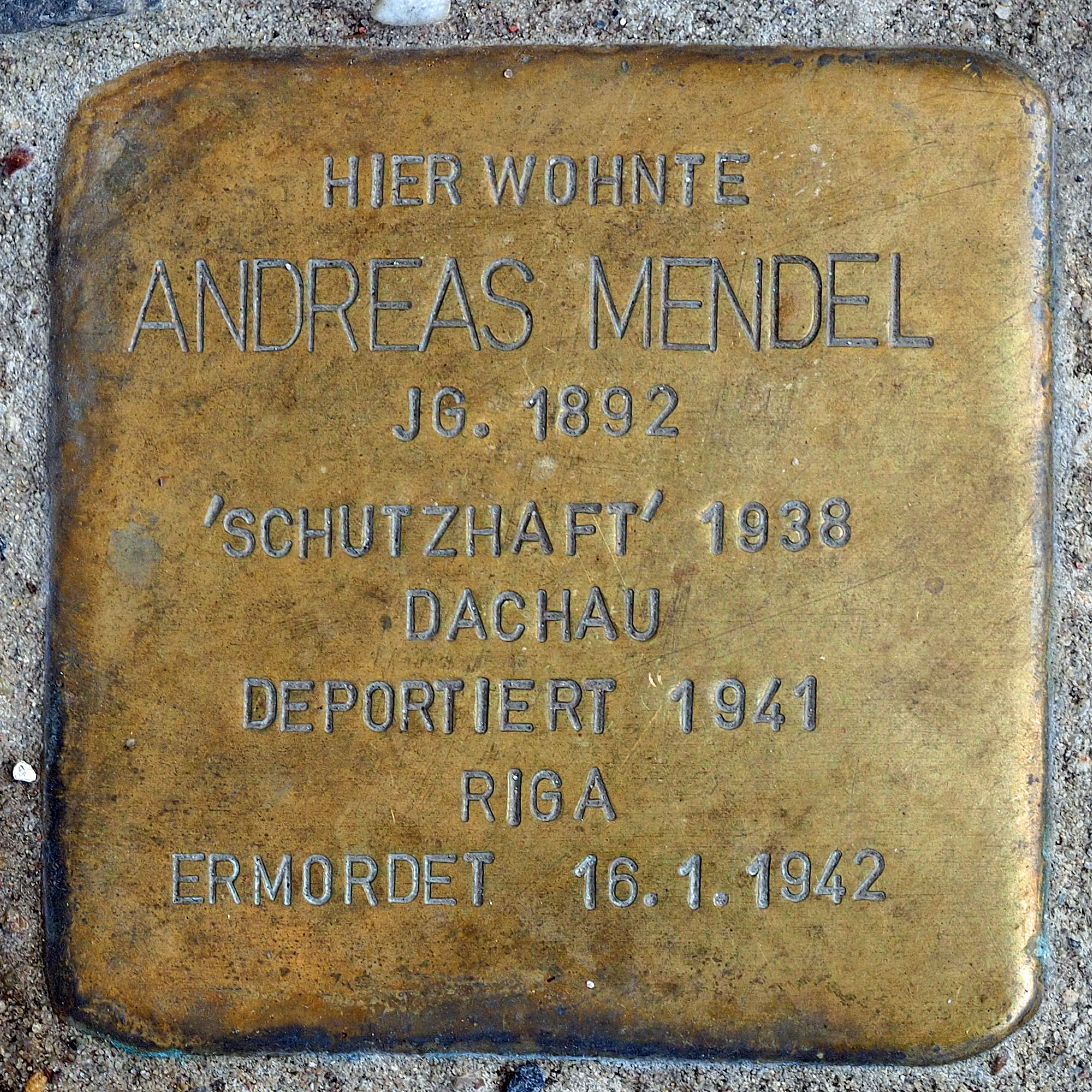 Stolpersteine in Kempen: Andreas Mendel, Von-Loe-Straße 14